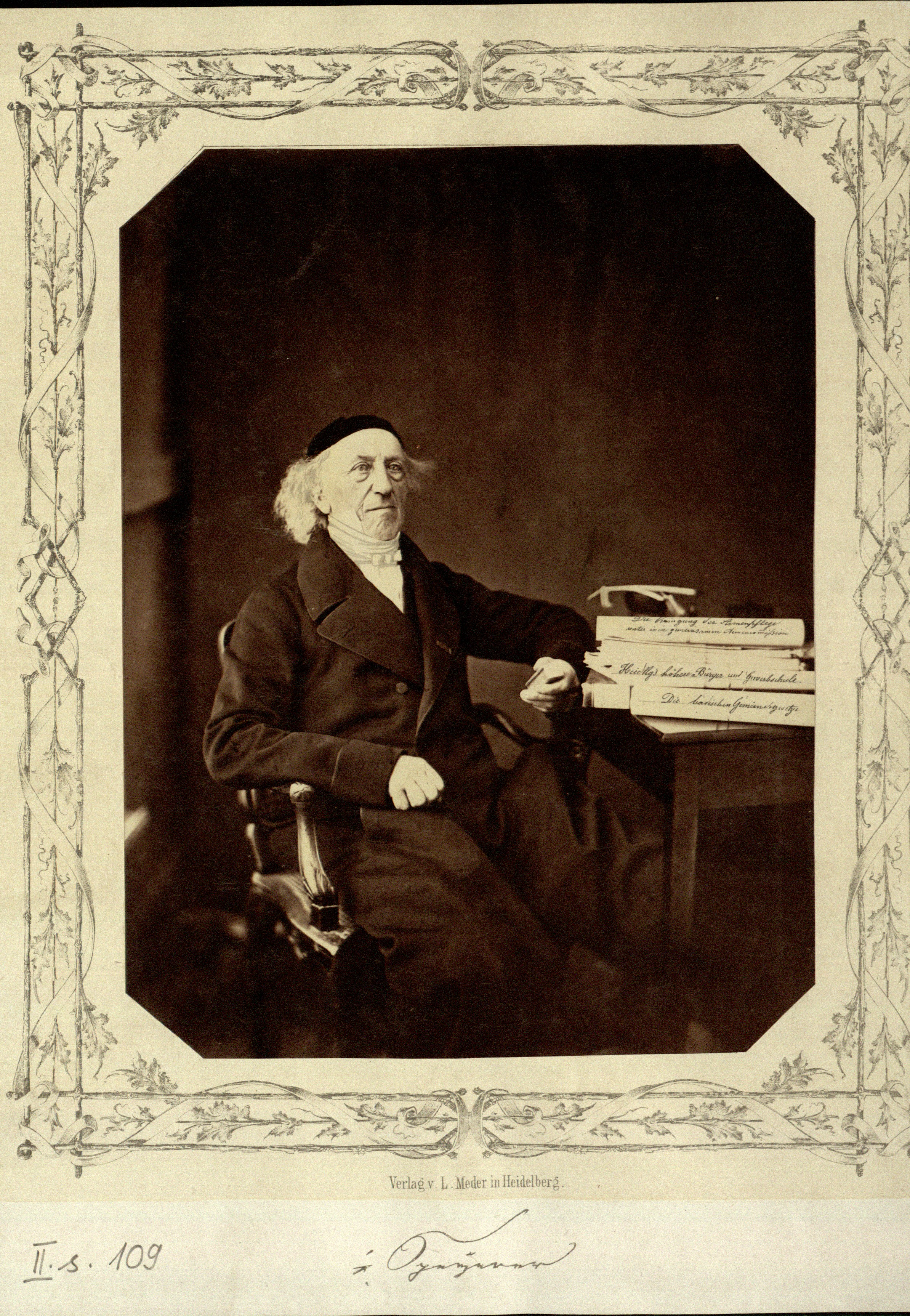 Jakob Wilhelm Speyerer, 1832–1840 Bürgermeister von Heidelberg